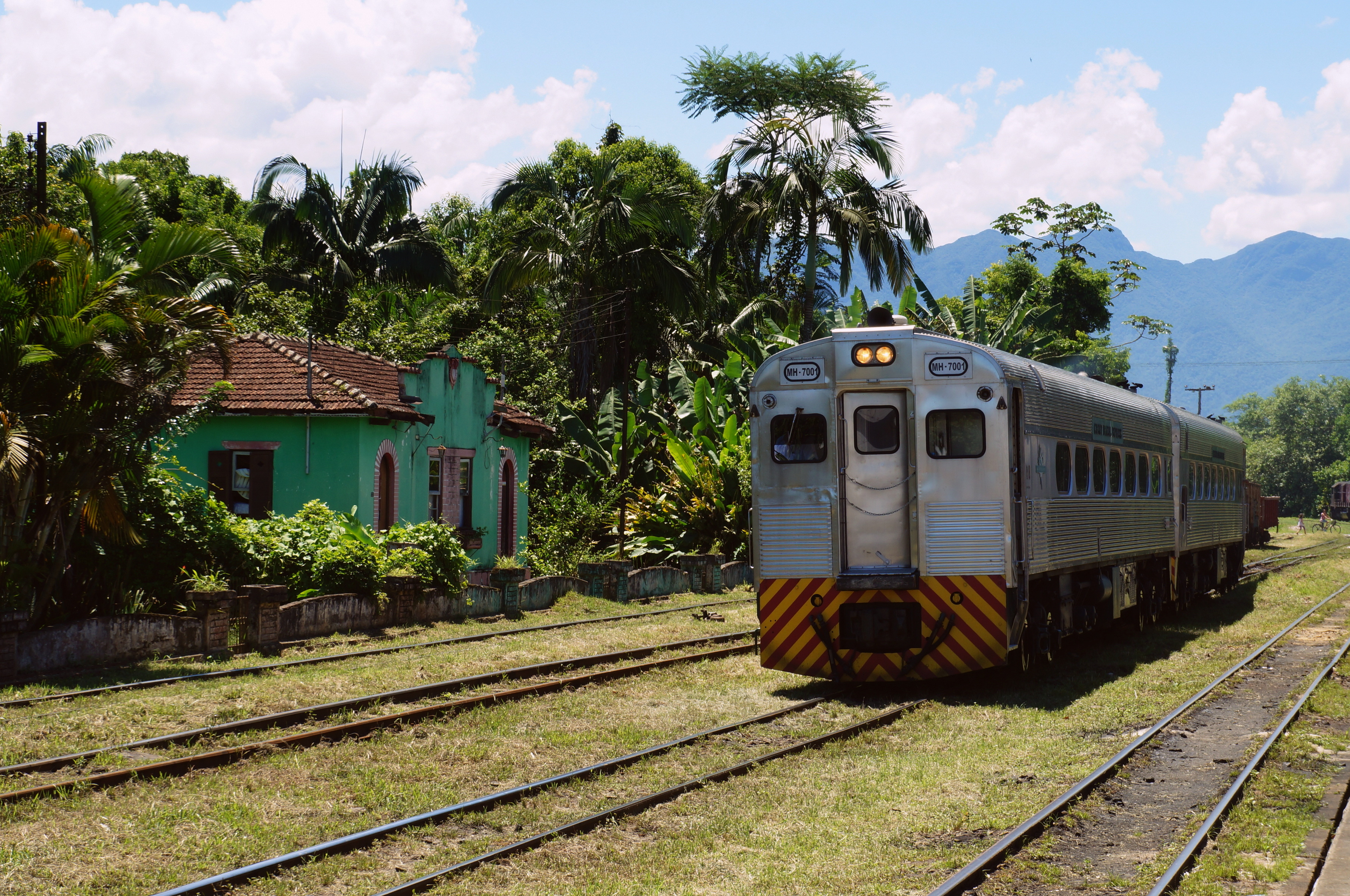 Morretes (PR)